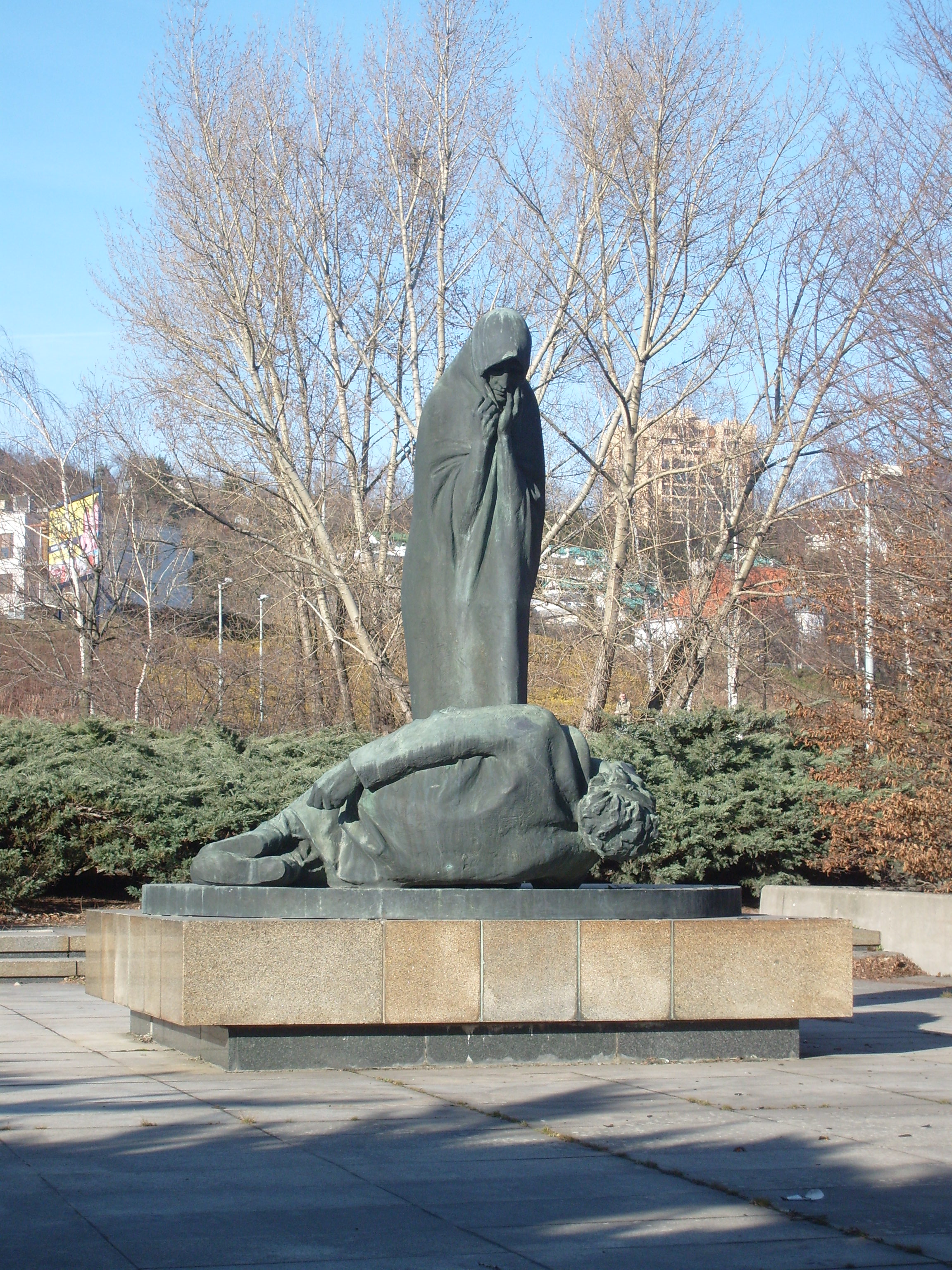 Sousoší Na památku bojovníků pražských barikád 5. 5. - 9. 5. 1945 v Praze-Libni u mostu Barikádníků.